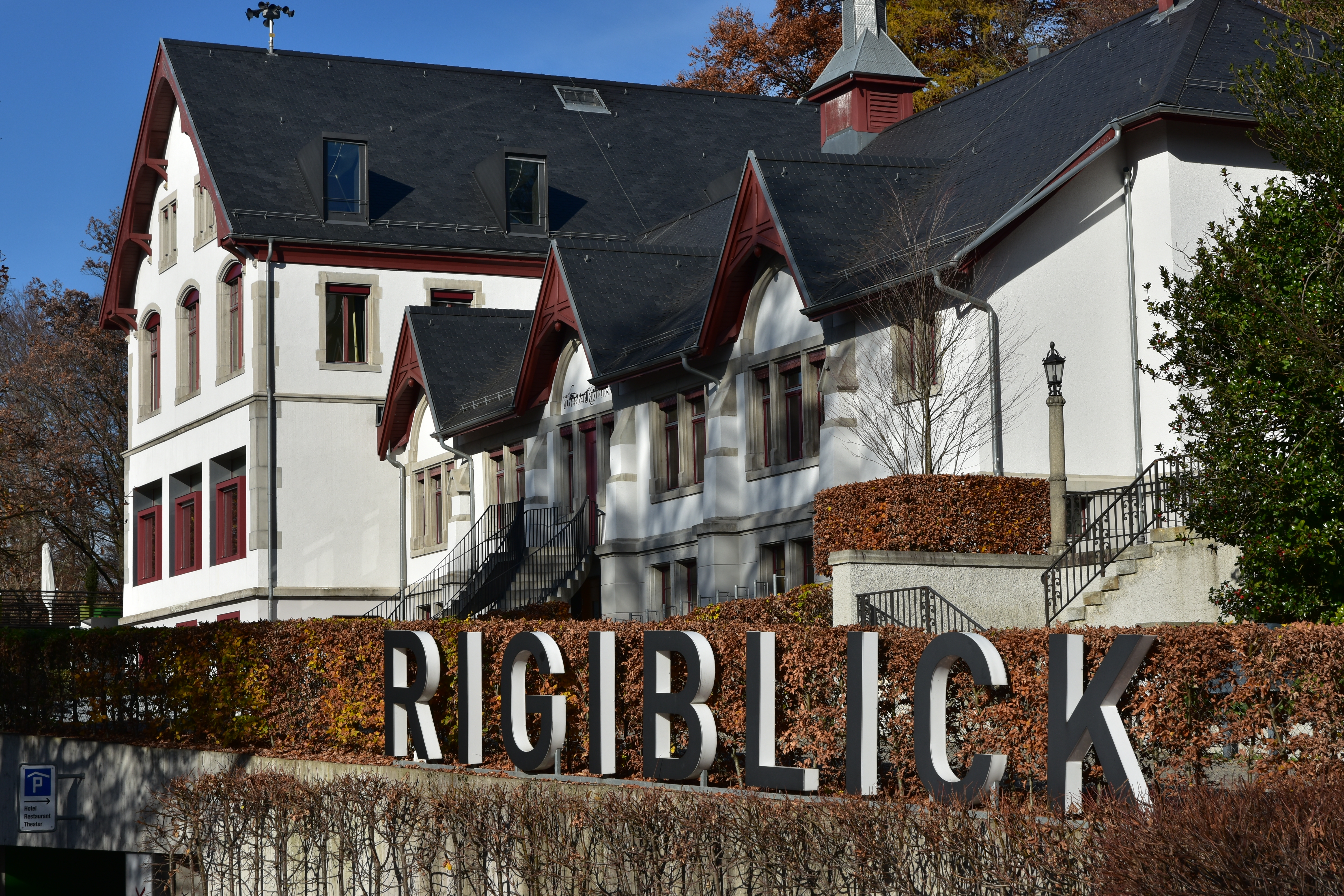 Theater Rigiblick, ZVU Rigiblick in Zürich (Switzerland)